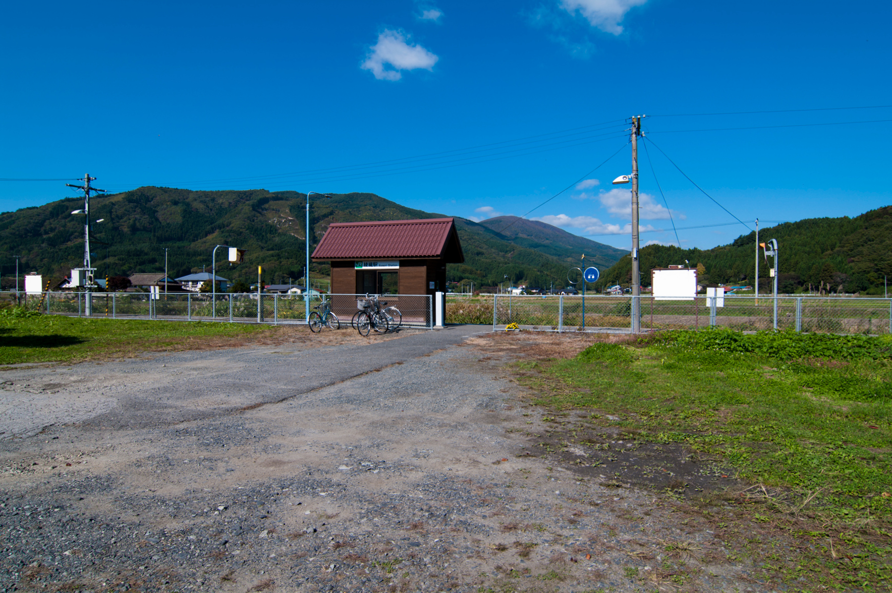 東日本旅客鉄道釜石線綾織駅